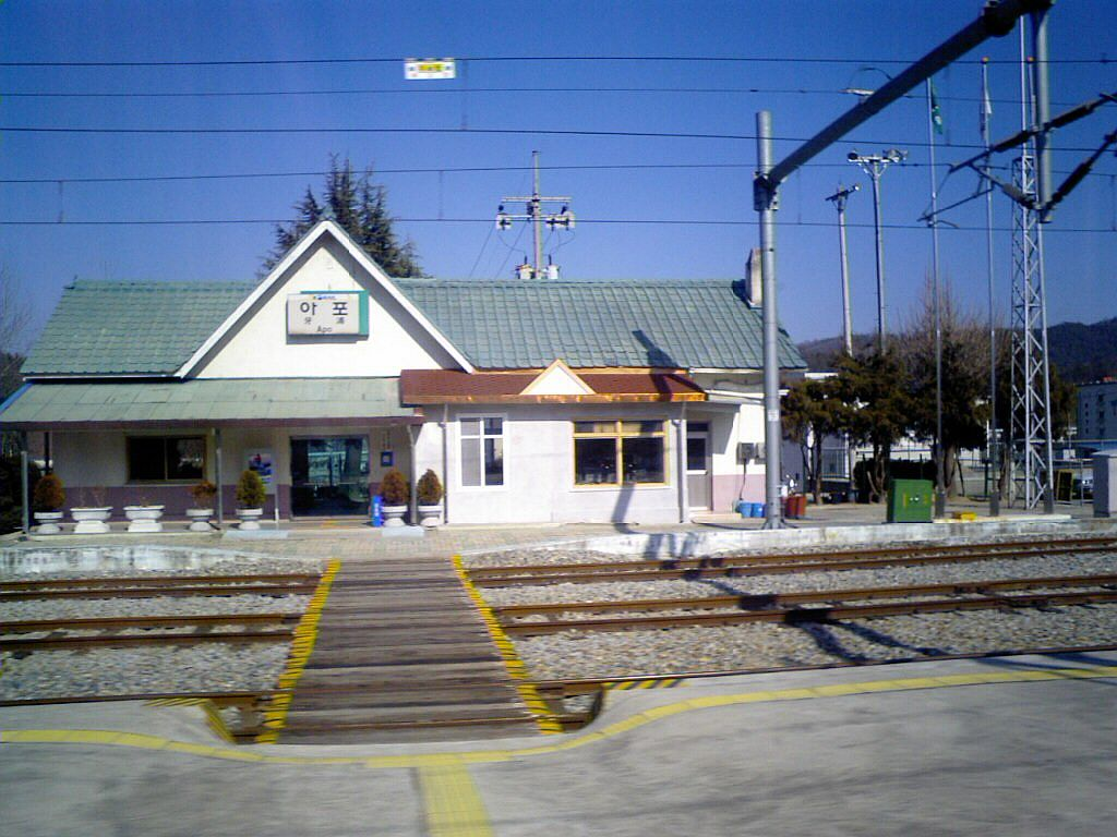 京釜線牙浦駅